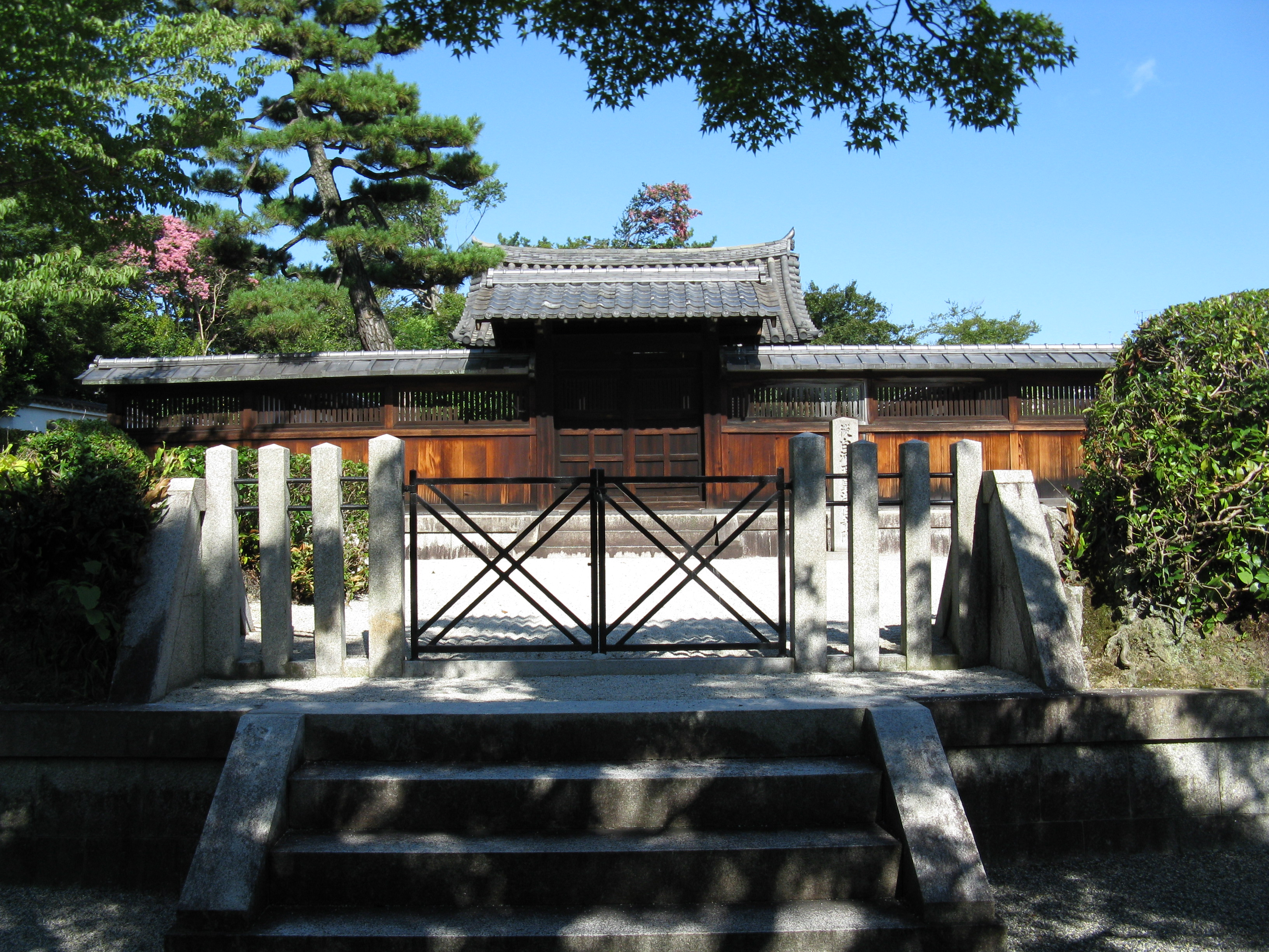 後白河天皇法住寺稜